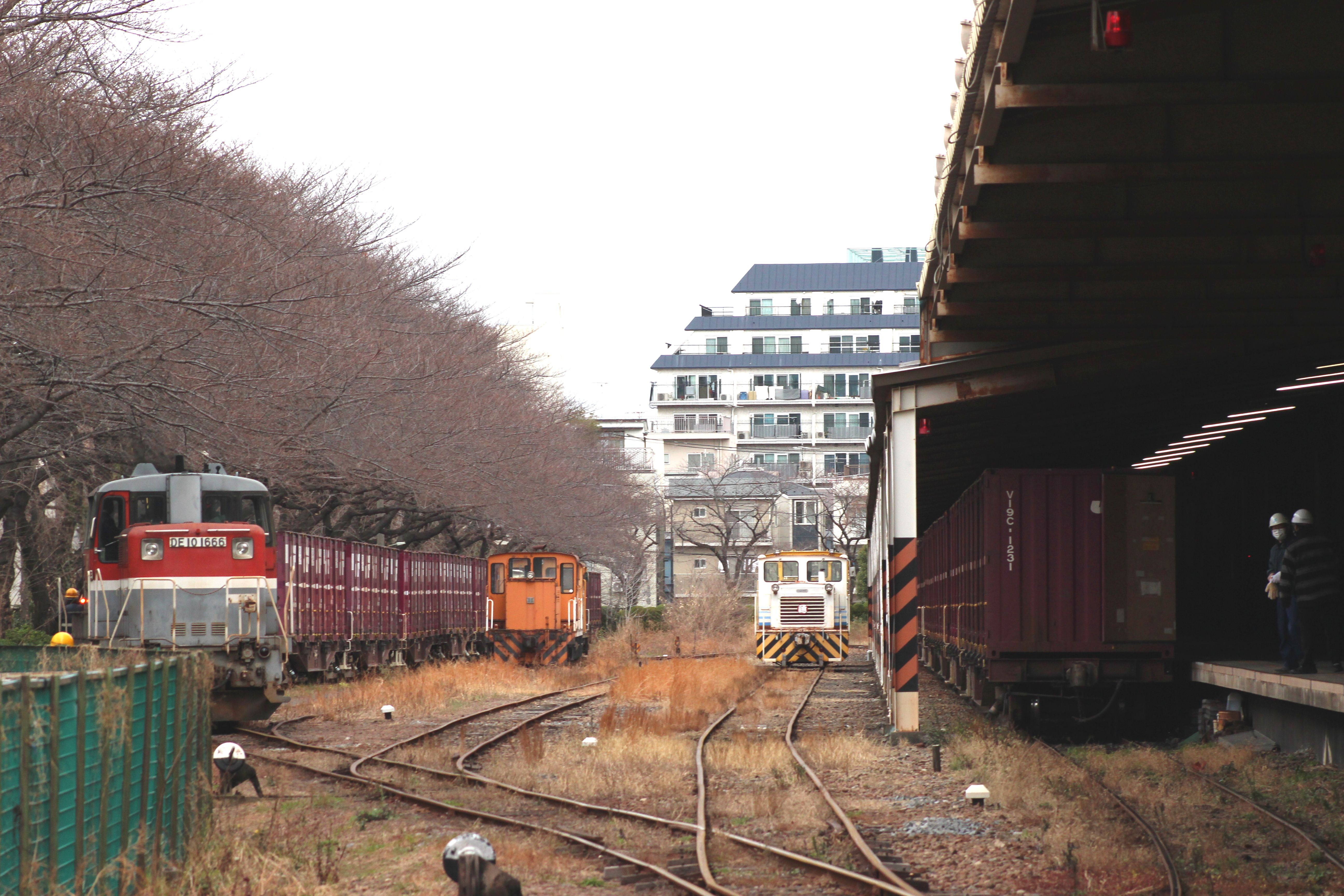 東北本線貨物支線（北王子線）北王子駅構内